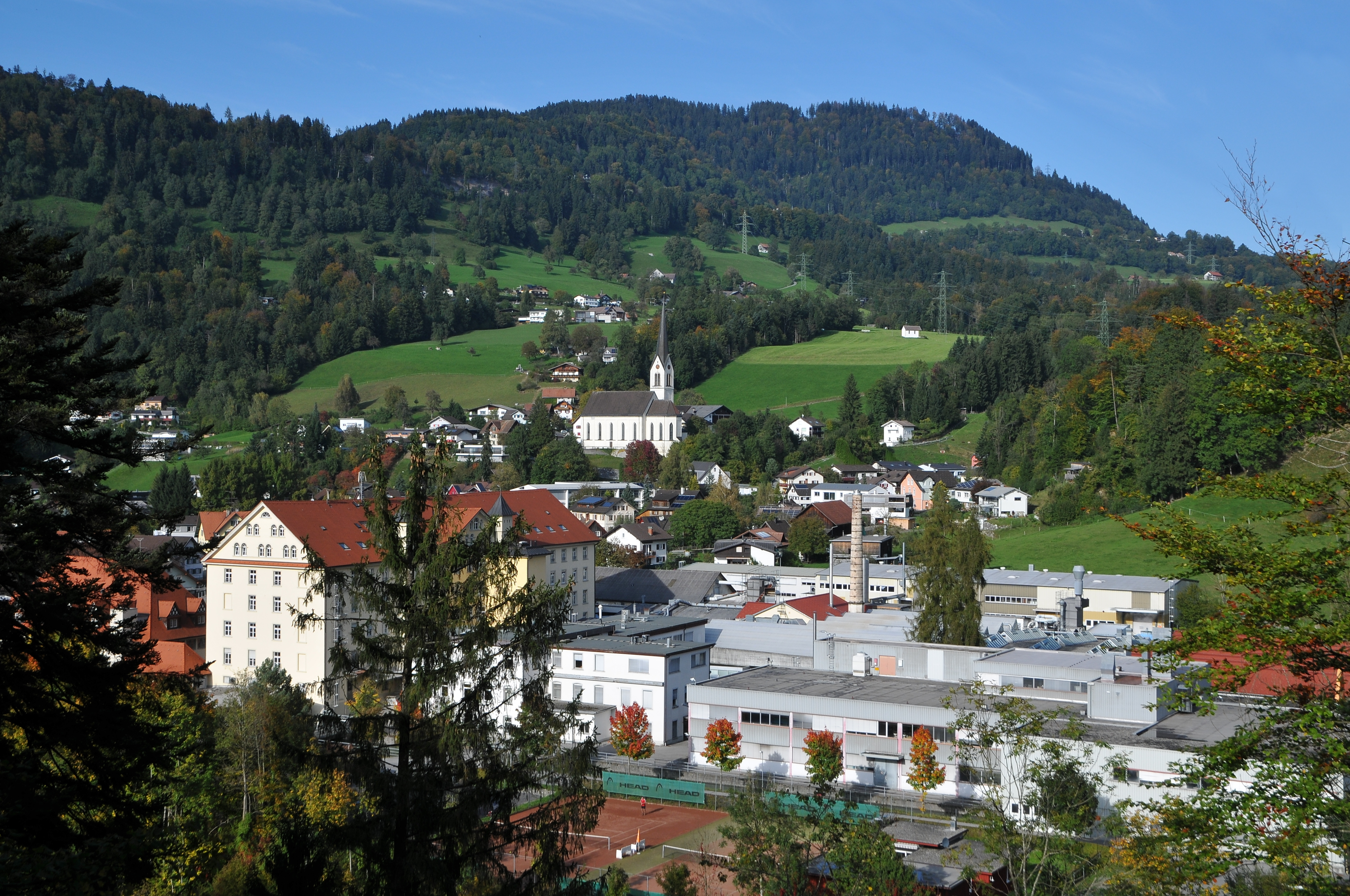 Kennelbach mit der Pfarrkirche hl. Josef in Vorarlberg.